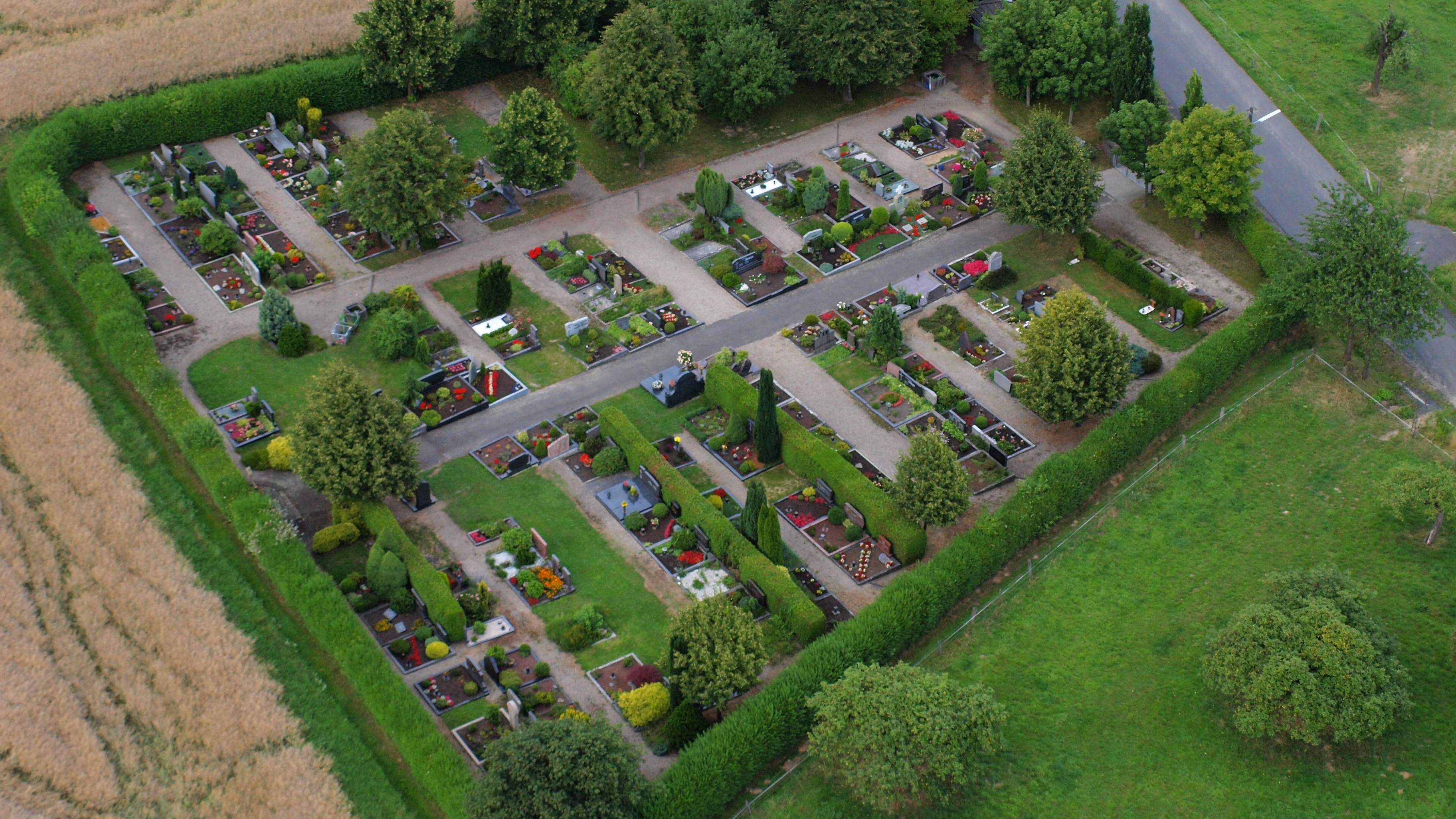 Friedhof, Hofener Straße, Westerhausen, Stadt Hennef (Sieg): Luftaufnahme